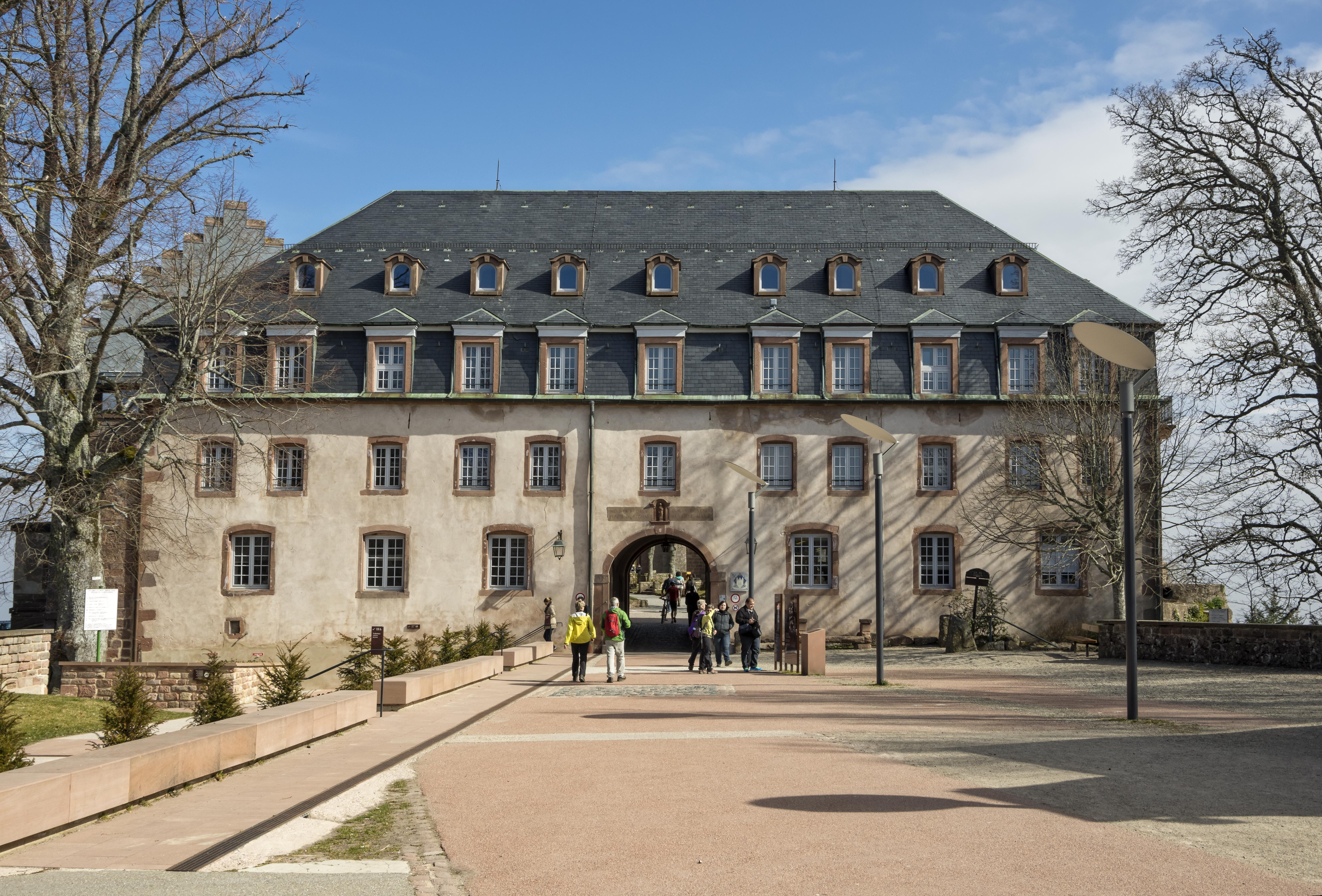 Bilder vom Le Mont ste. Odile (Odilienberg im Elsaß) Blick auf das Eingangsgebäude